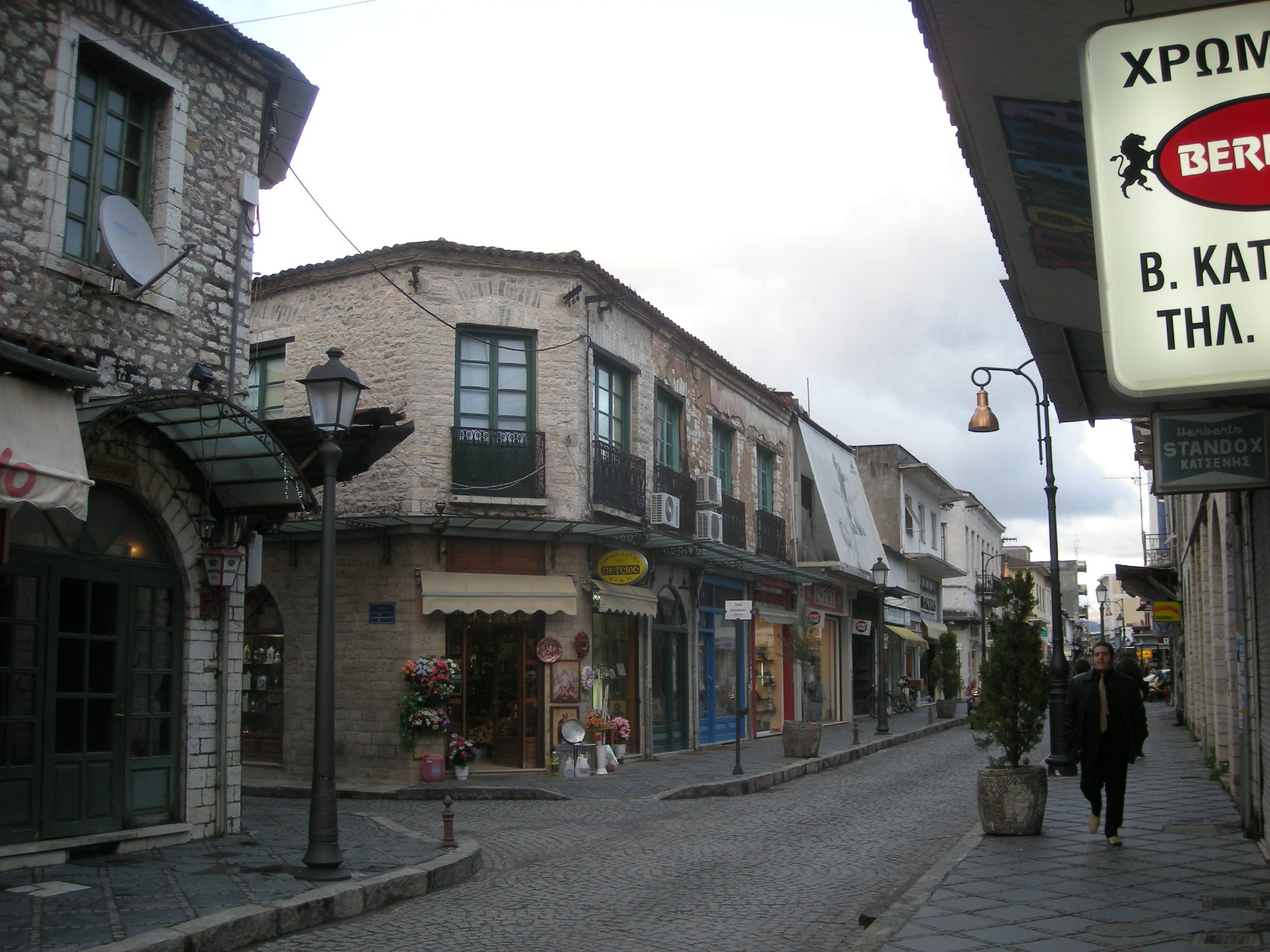 Οδός στο κέντρο της Γιάννενας